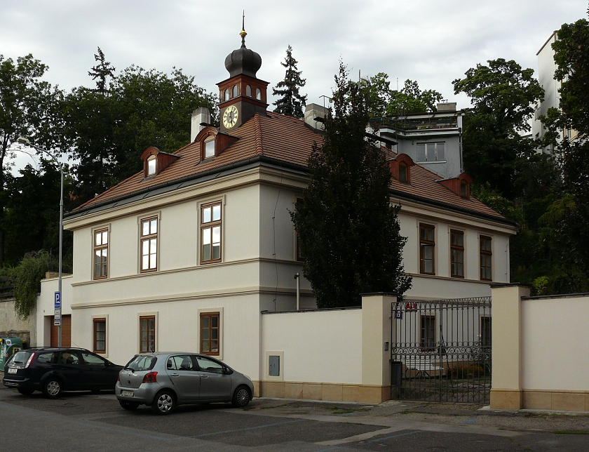 Česky: Usedlost Vondračka